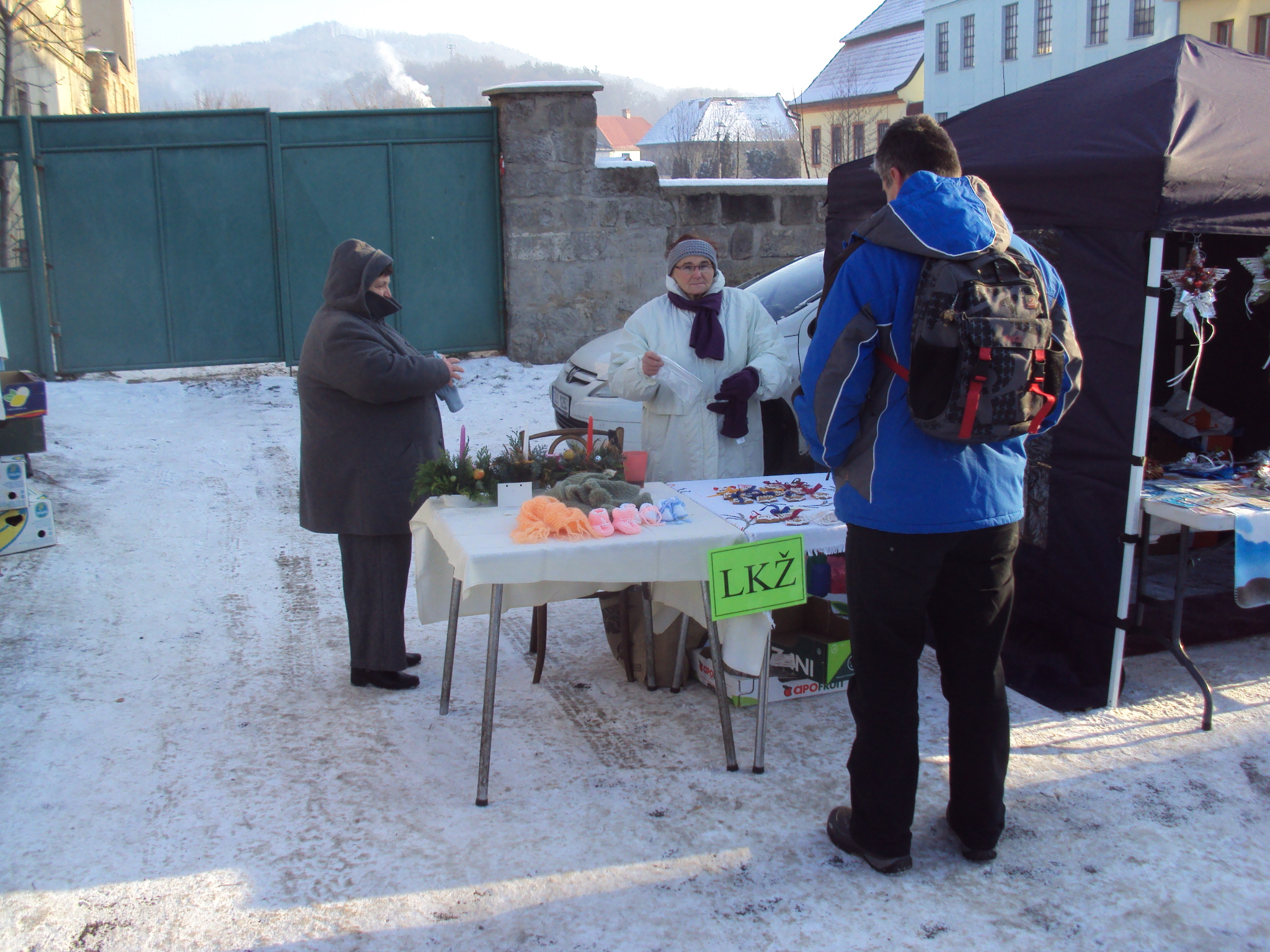 Česky: LKŽ na akci Advent 2012 v Zákupech